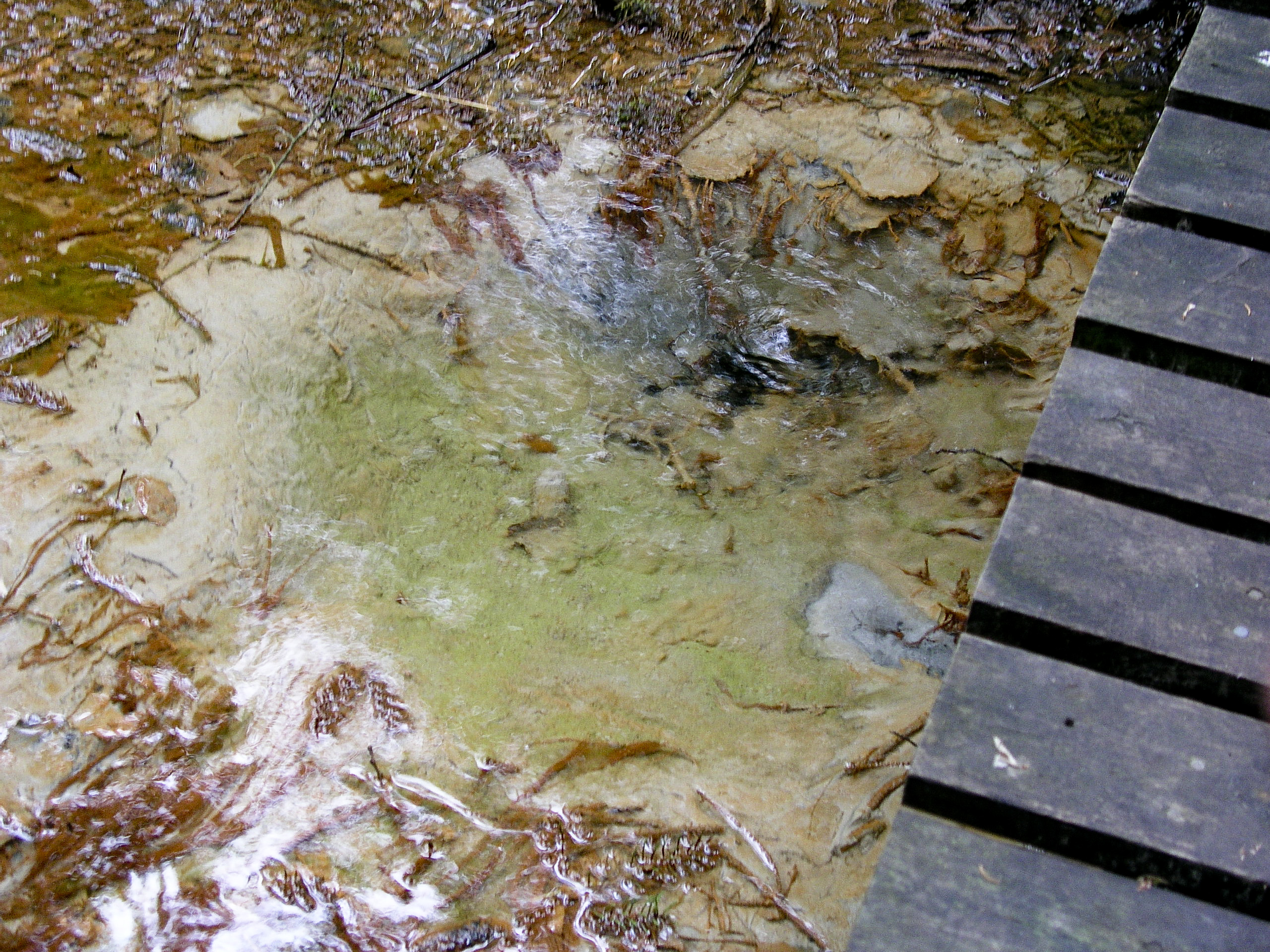 Kärna mosse naturreservat, en av kallkällorna. Malmslätt, Linköping, Sverige.